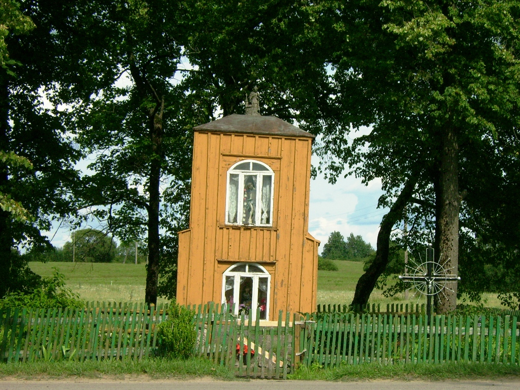 Didžioji Vytogalos koplytėlė